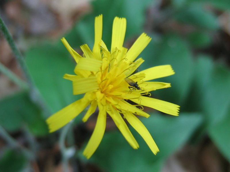 Wald-Habichtskraut Hieracium murorum, Müritz-Gebiet